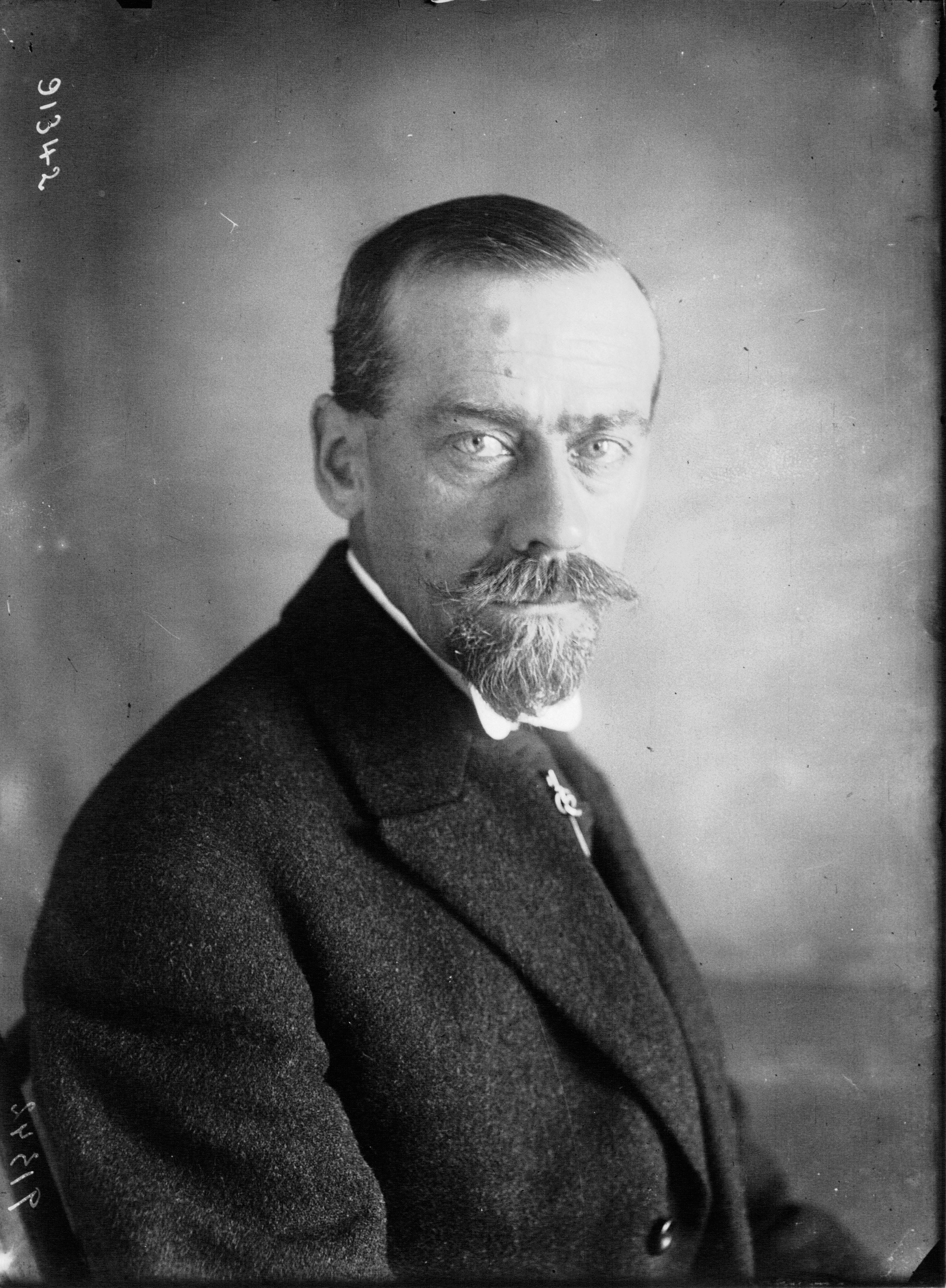 M. Lermusiaux du Racing Club de France : [photographie de presse] / Agence Meurisse